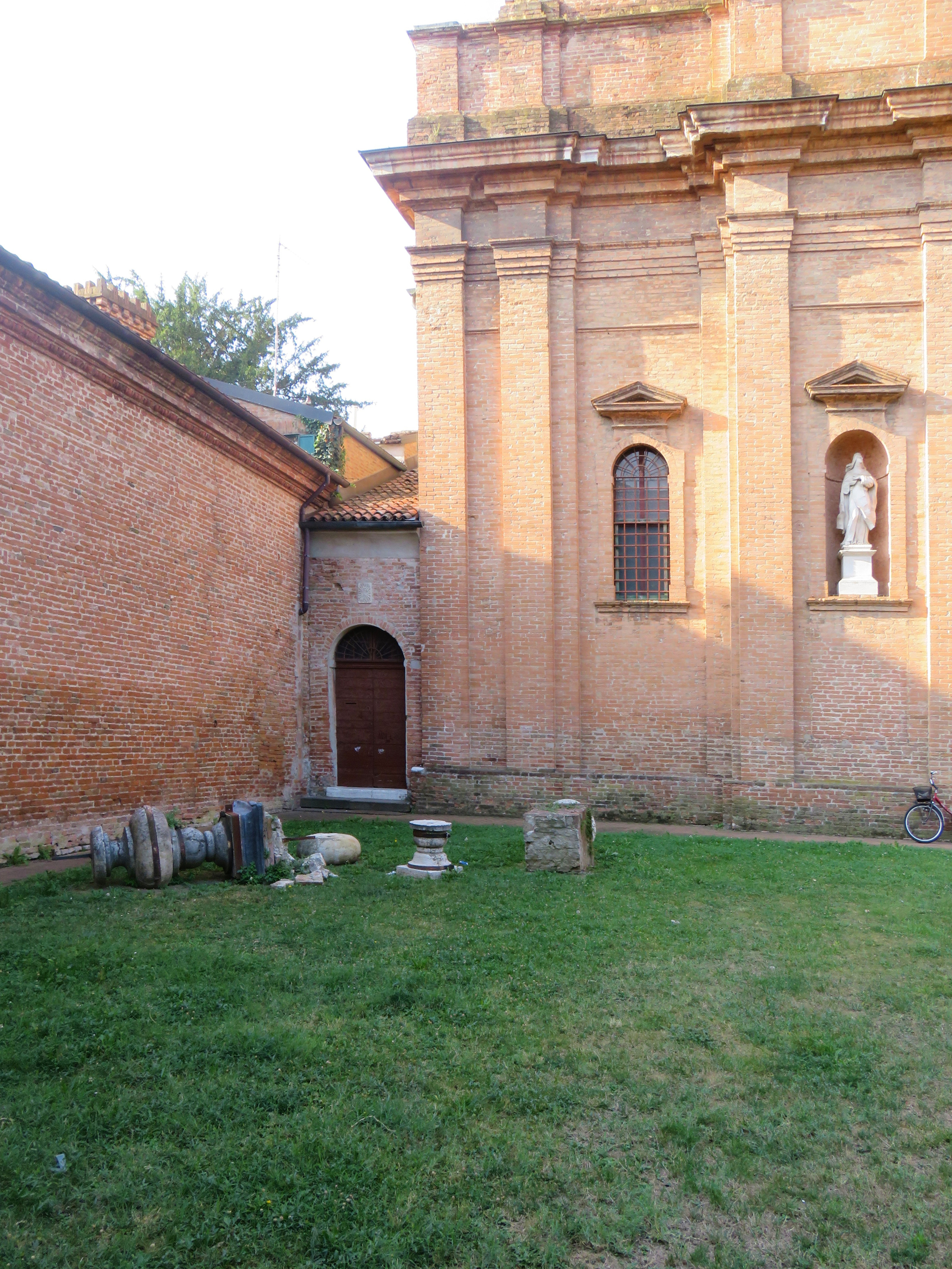 Chiesa di San Girolamo a Ferrara. Dopo il terremoto dell'Emilia del maggio 2012 le guglie decorative sono state rimosse per sicurezza e sono state lasciate nel giardino antistante.